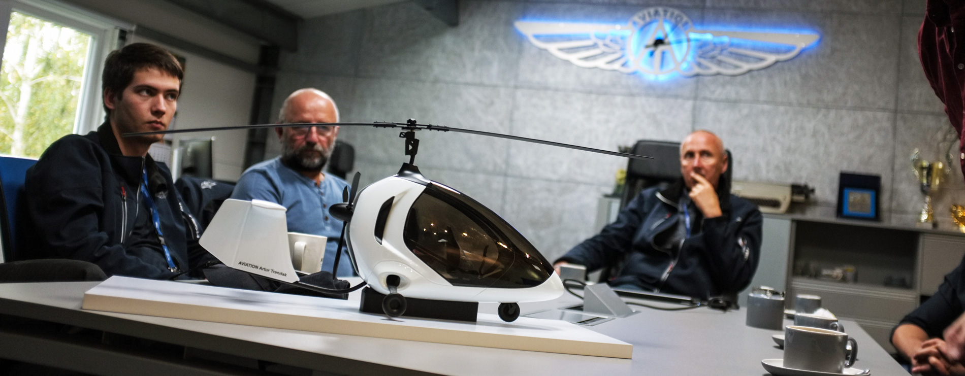 Prototyp wiatrakowca zaprojektowany przez biuro projektowe 2sympleks - Wzornictwo Przemysłowe dla firmy Aviation Artur Trendak. Wiatrakowiec Twistair 2.0 od 2018 roku prototypowany i przygotowywany do produkcji, tego samego roku otrzymał najważniejszą nagrodę projektową zwaną "Oscarem Designu" - Red Dot Design Award.